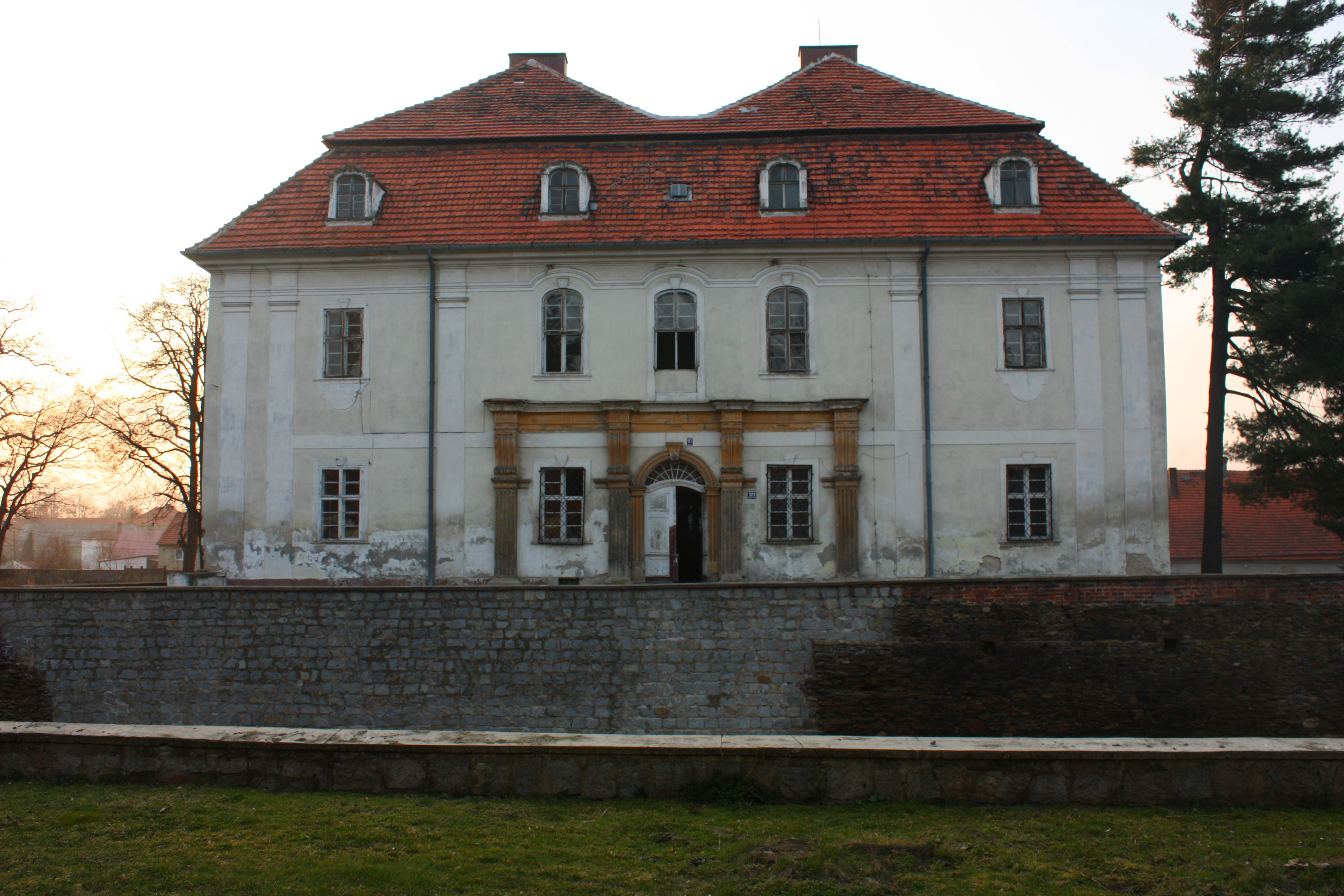 Mierczyce - zespół dworsko – parkowy z folwarkiem, XVI/XVII, XVIII-XIX w.: dwór (zabytek nr A/3508/261 z 27.04.1951)